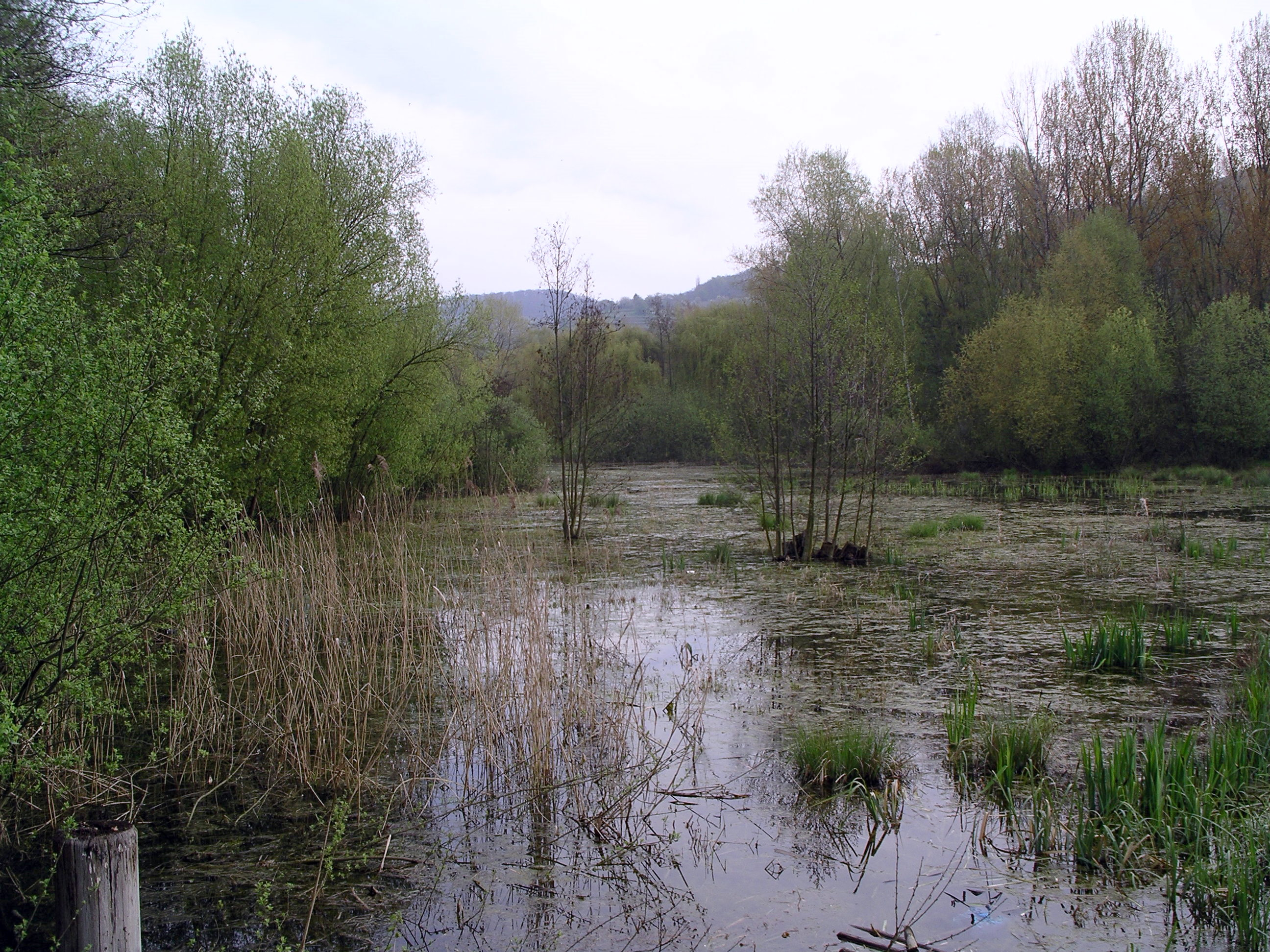 Naturschutzgebiet Rohrwiesen (ehem. "Tierpark") in Hemsbach an der Bergstraße